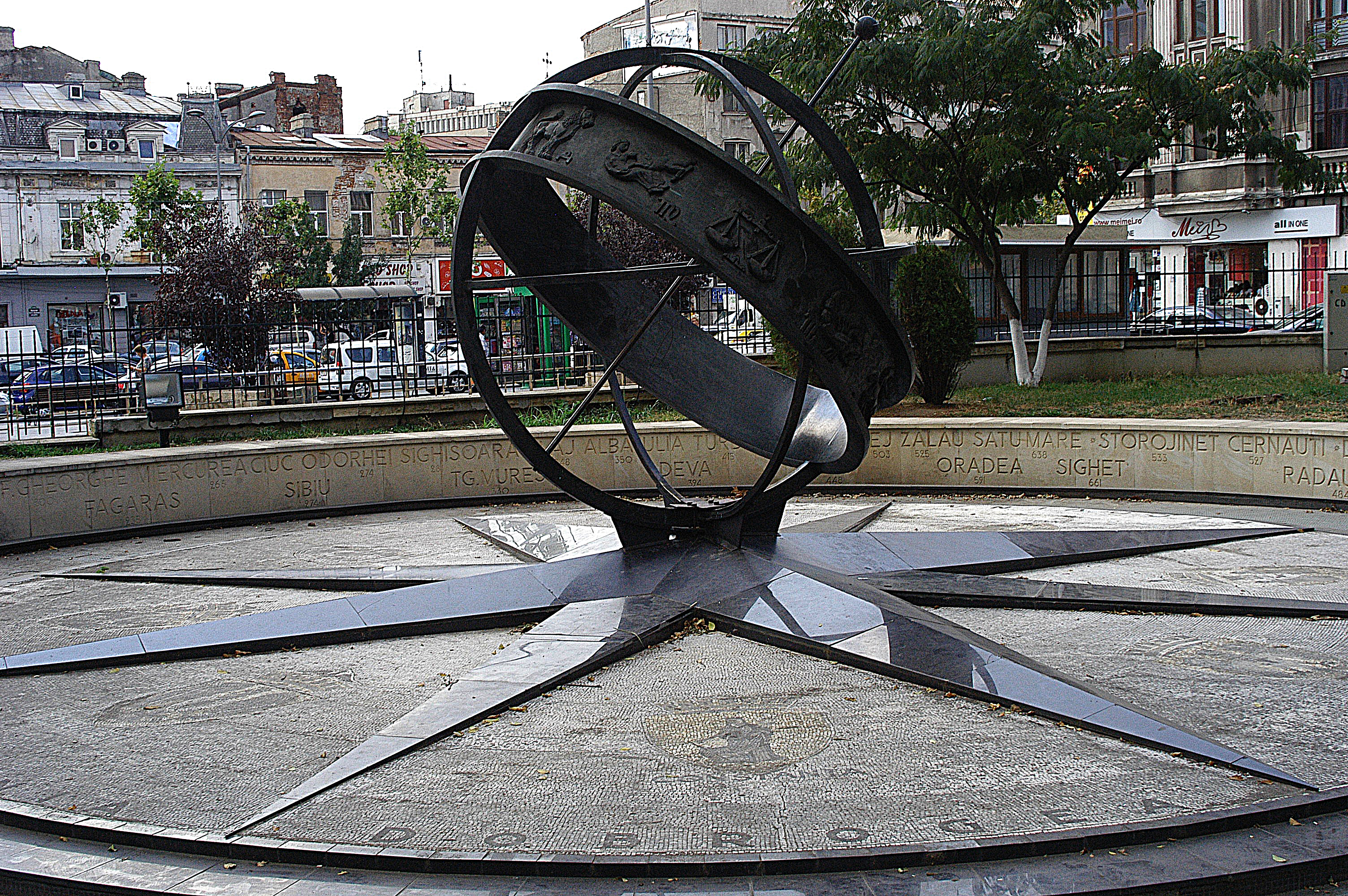 Astrolab la Km 0 din Bucuresti (biserica Sf.Gheorghe)